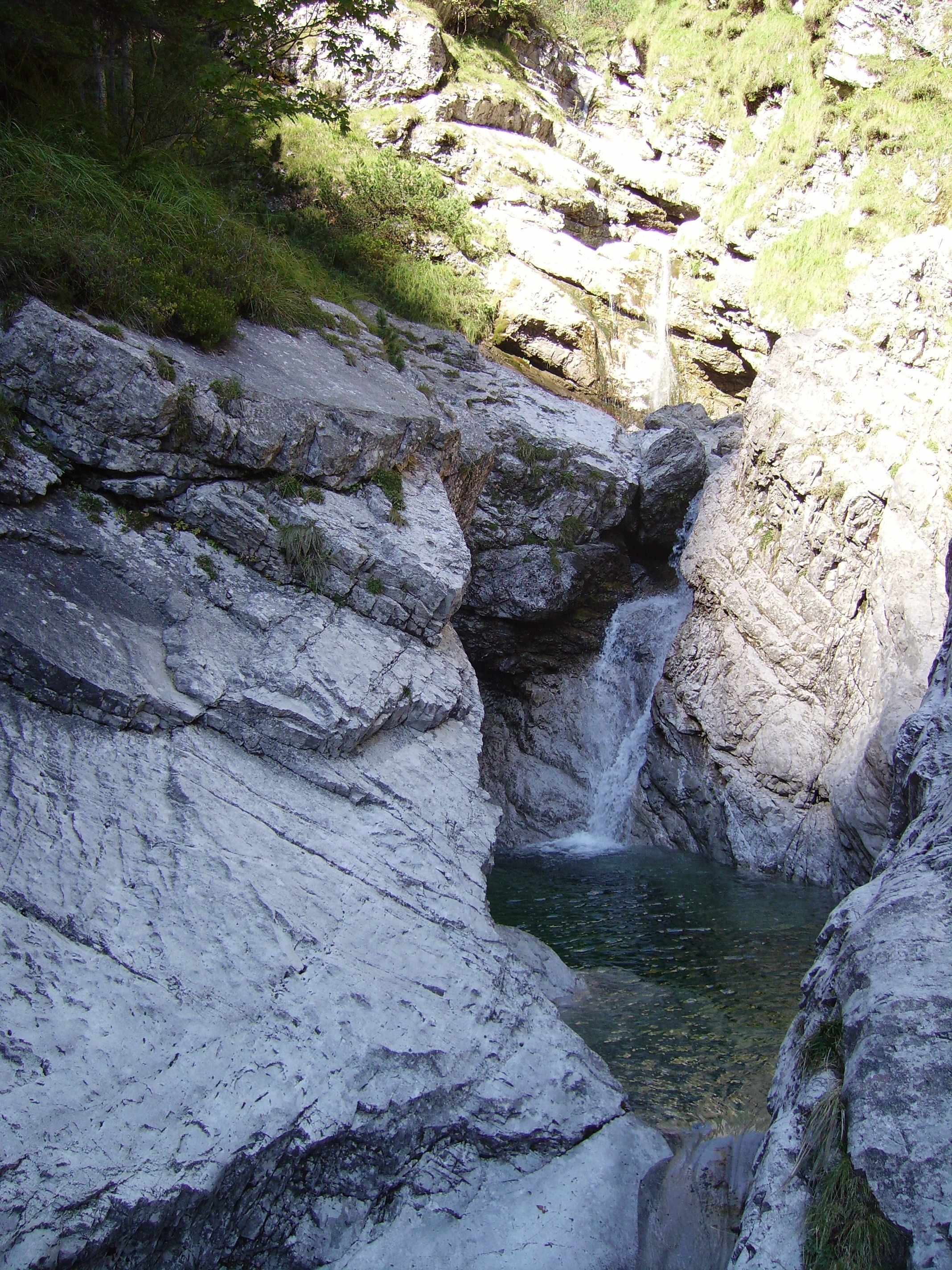 Il torrente Ardo poco dopo la sorgente nei pressi del rifugio VII Alpini